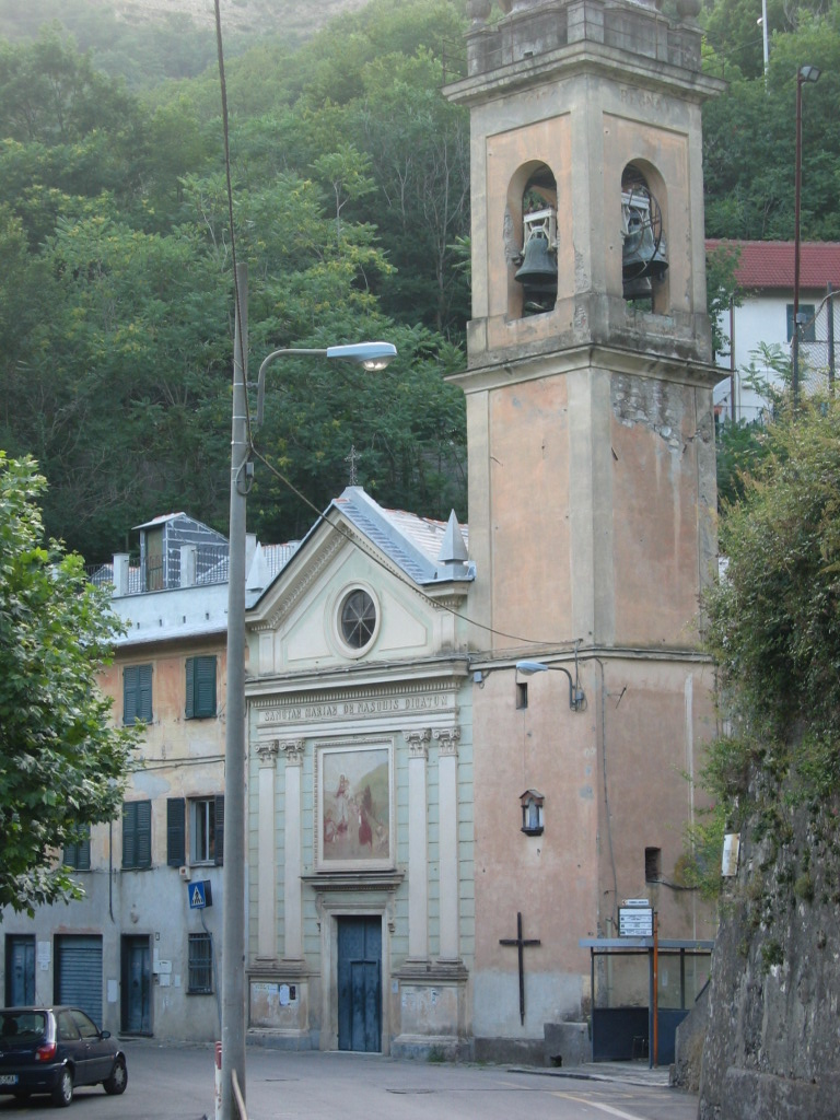 Chiesa parrocchiale di S. Maria delle Nasche in Borgoratti (Genova)